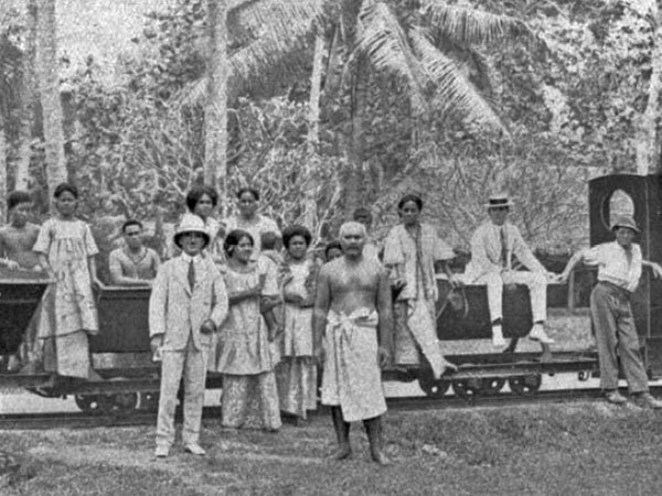 Telefunkeneisenbahn in Apia